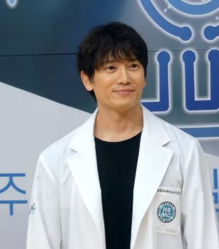 18일 오후 서울시 양천구 목동 SBS에서 SBS 새 금토드라마 '의사 요한' 제작발표회가 열려 배우 지성X이세영X이규형X황희X정민아X김혜은X신동미가 참석해 개별 포토타임을 갖고 있다.